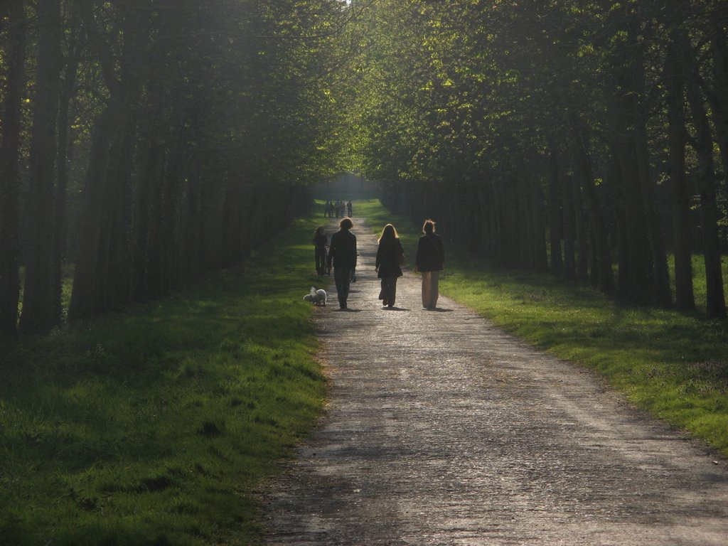 Parc du Chateau de Fontainebleau